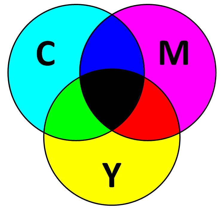 Получение основных цветов при наложении красок модели CMYK